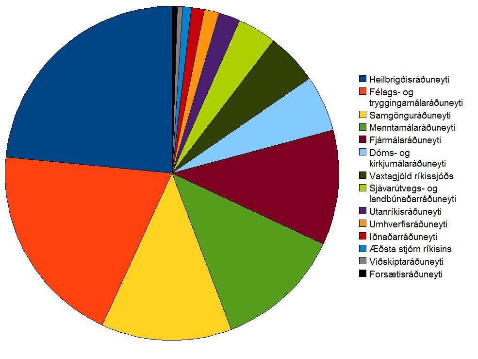 Fjárlög 2008